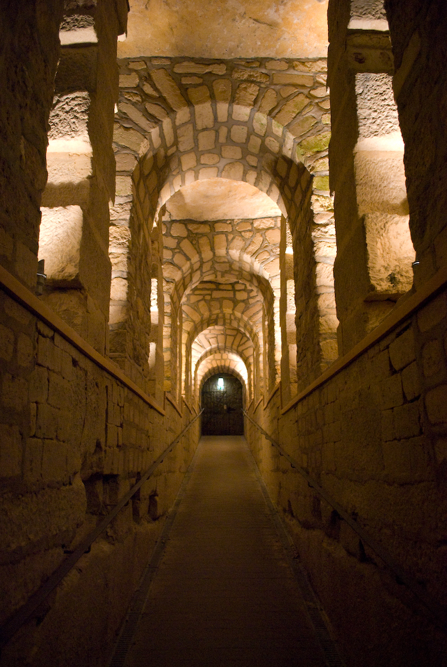 Le passage dit des doubles carrières dans les Catacombes de Paris.